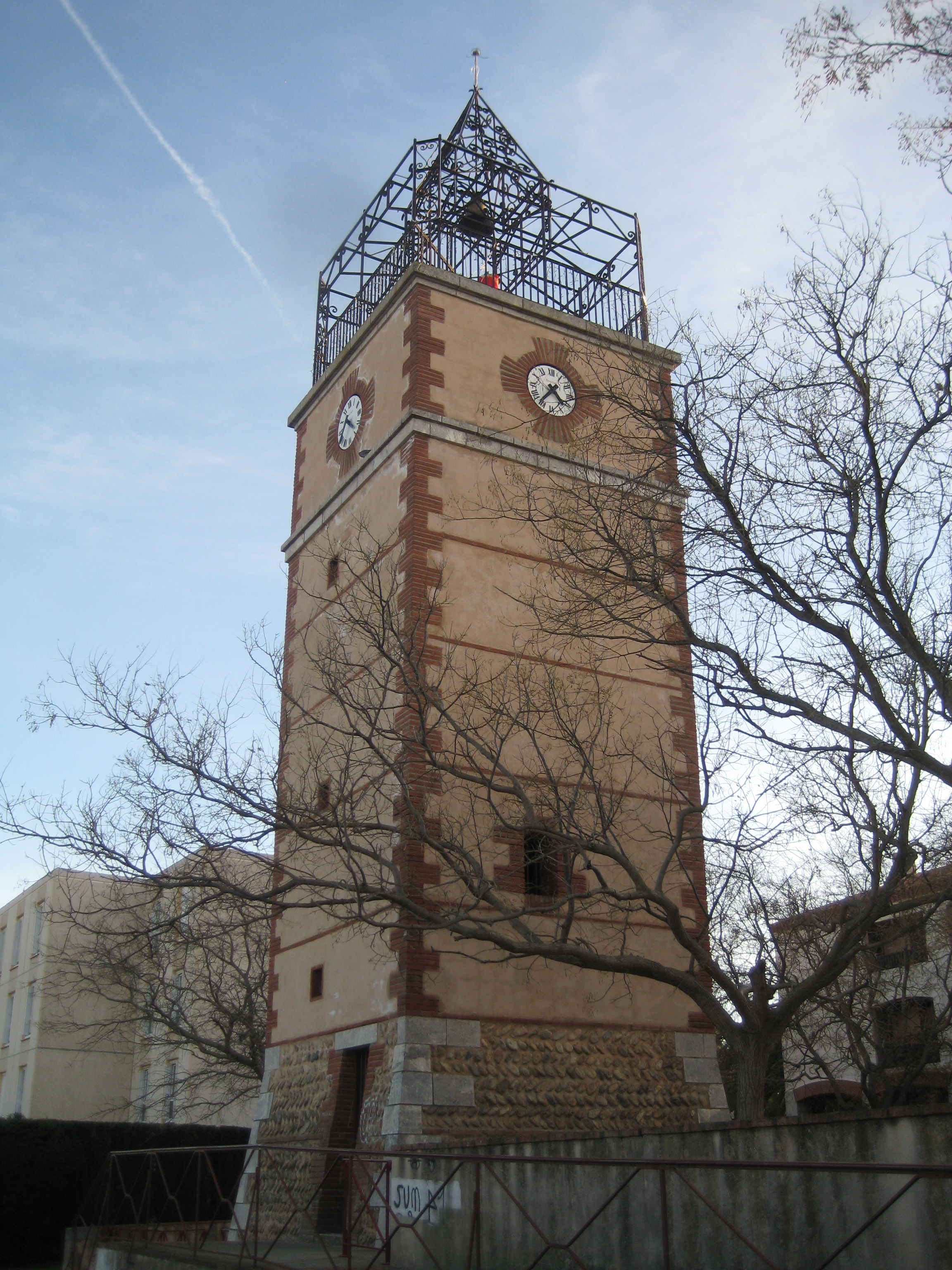 tour avec horloge à Saint-Estève